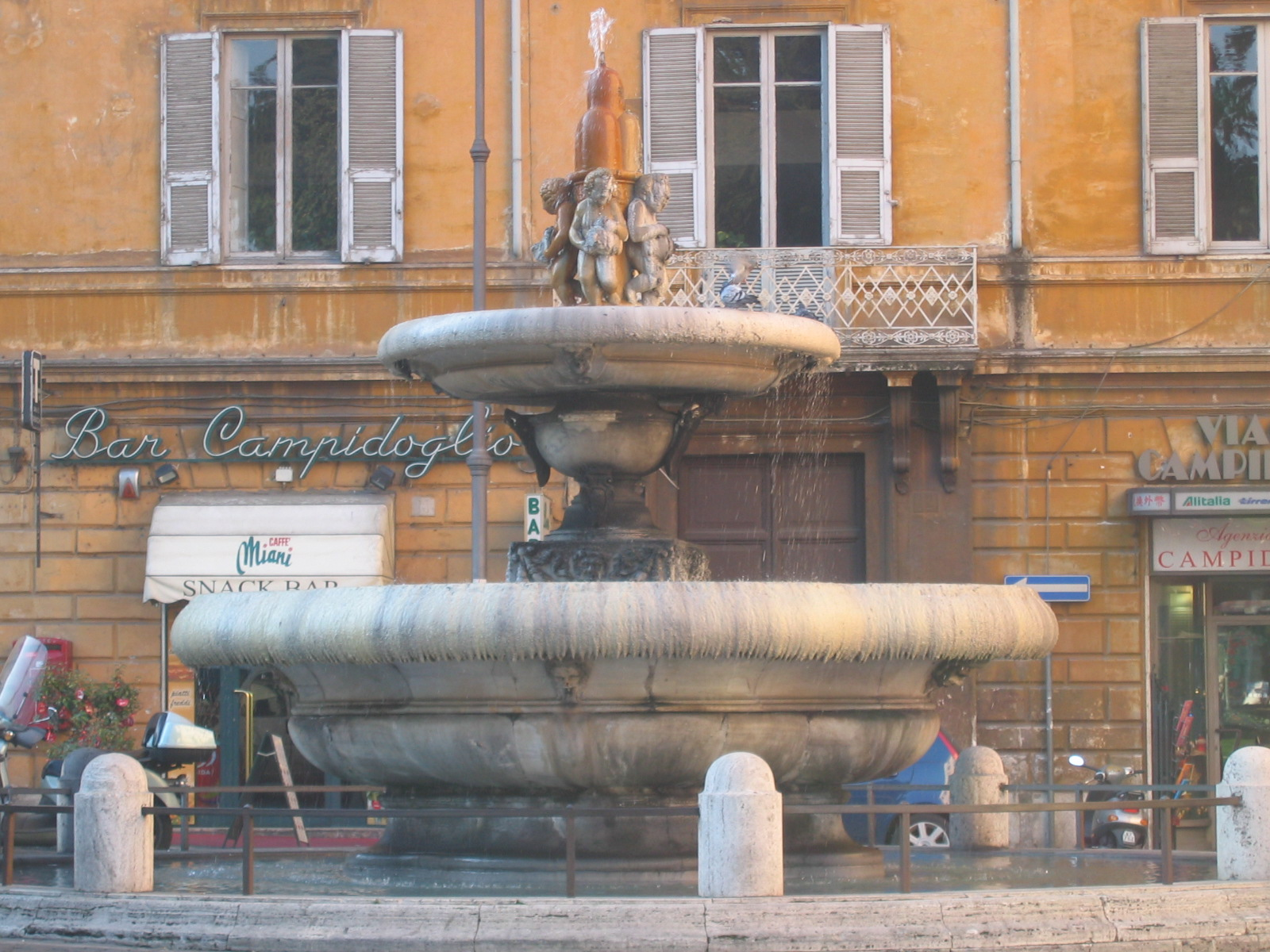 Description = Fontana di piazza d'Aracolei, Roma. Giacomo Della Porta. 1589 Source = own work Date = 2006-12-28 Authors = “Sara Di Marcello(User:Sara Di Marcello)” “Livia Mandalà(User:livman)”. . Permission = We, the authors of this work, hereby release it into the public domain